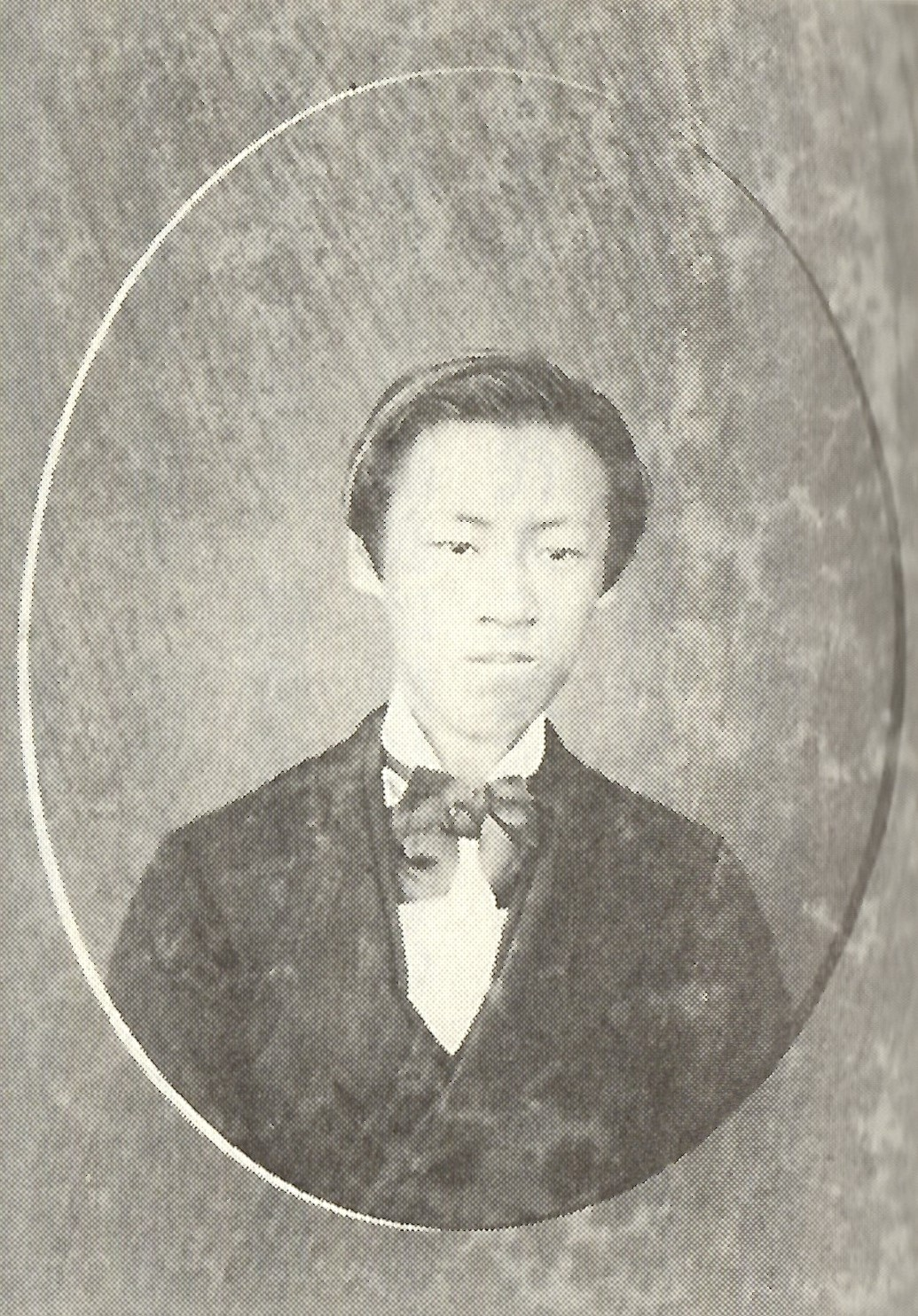 久世通章の肖像写真。